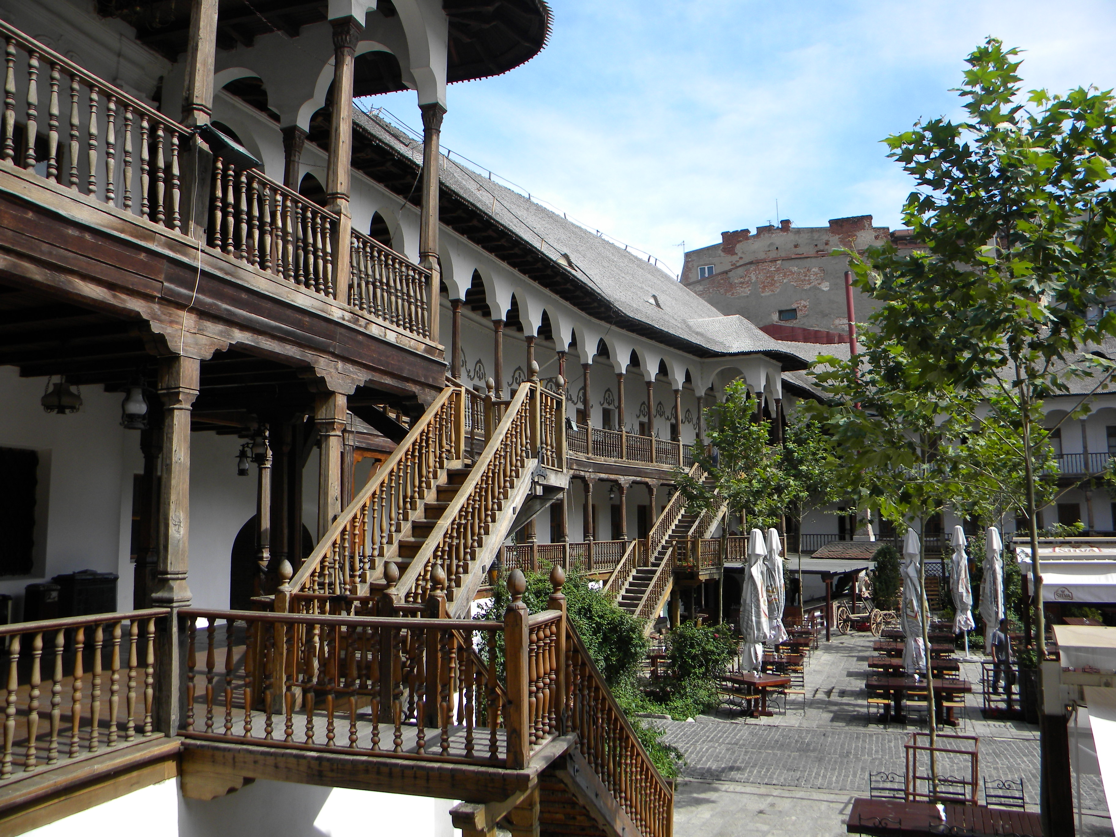 Bucuresti, Romania, Hanul lui Manuc (2); sector 3